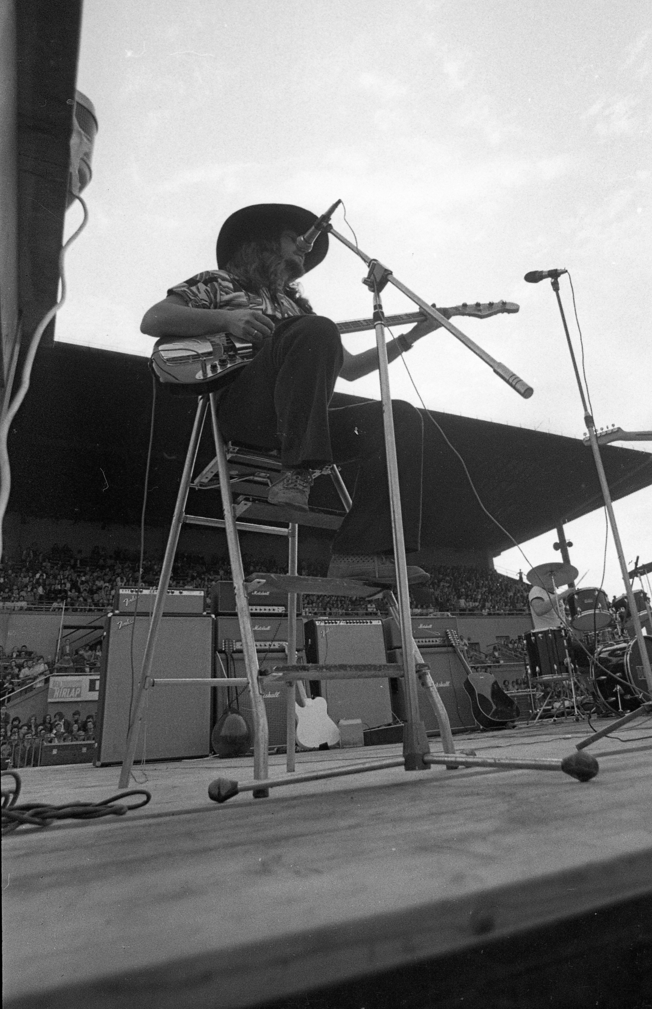 DVTK-stadion, Rockfesztivál. Orszáczky "Jackie" Miklós (Syrius). Location: Hungary Tags: rock festival, stadium, auditorium Title: DVTK-stadion, Rockfesztivál. Orszáczky \